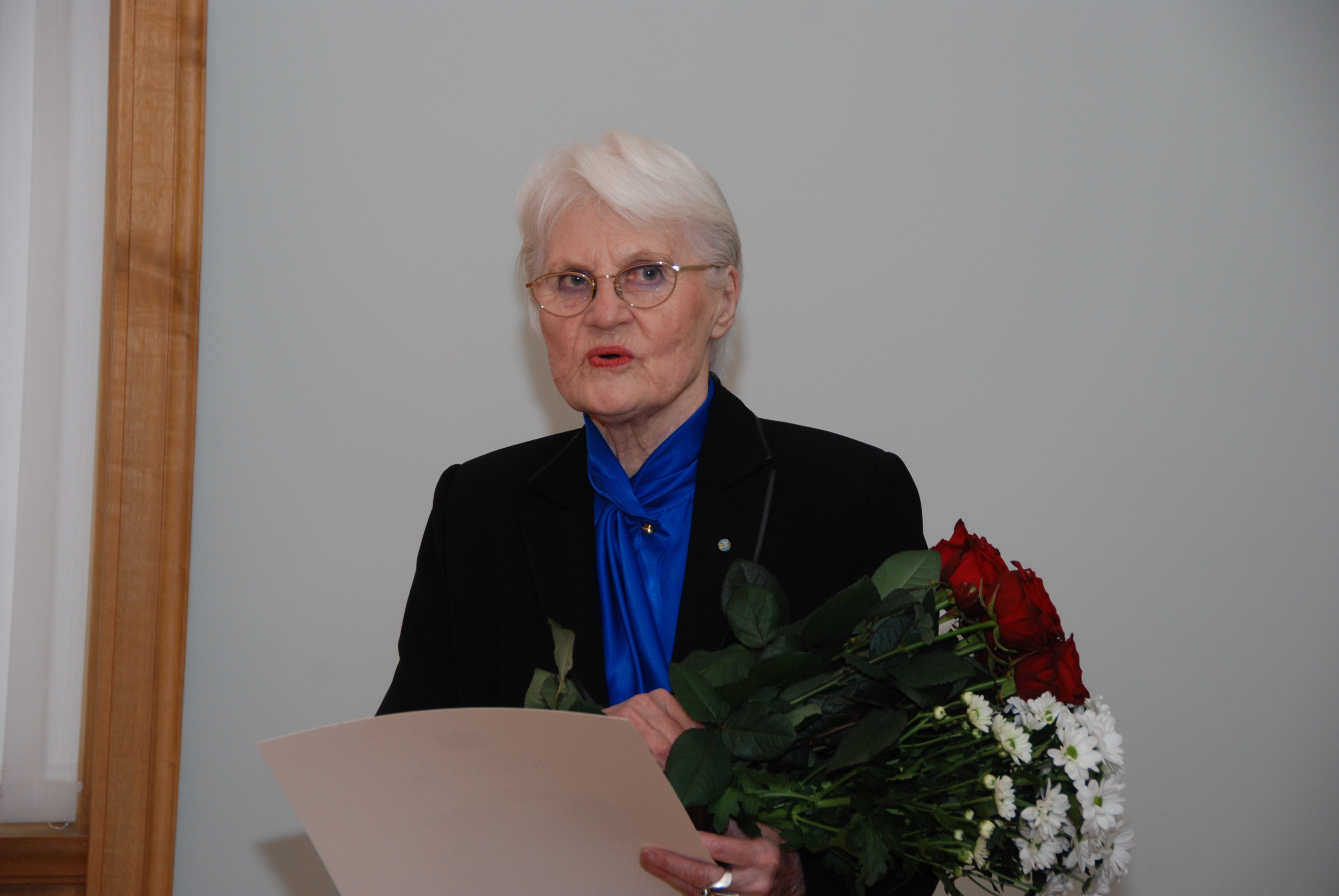 Gleznotāja Džemma Skulme Foto: Aivis Freidenfelds, Valsts kanceleja